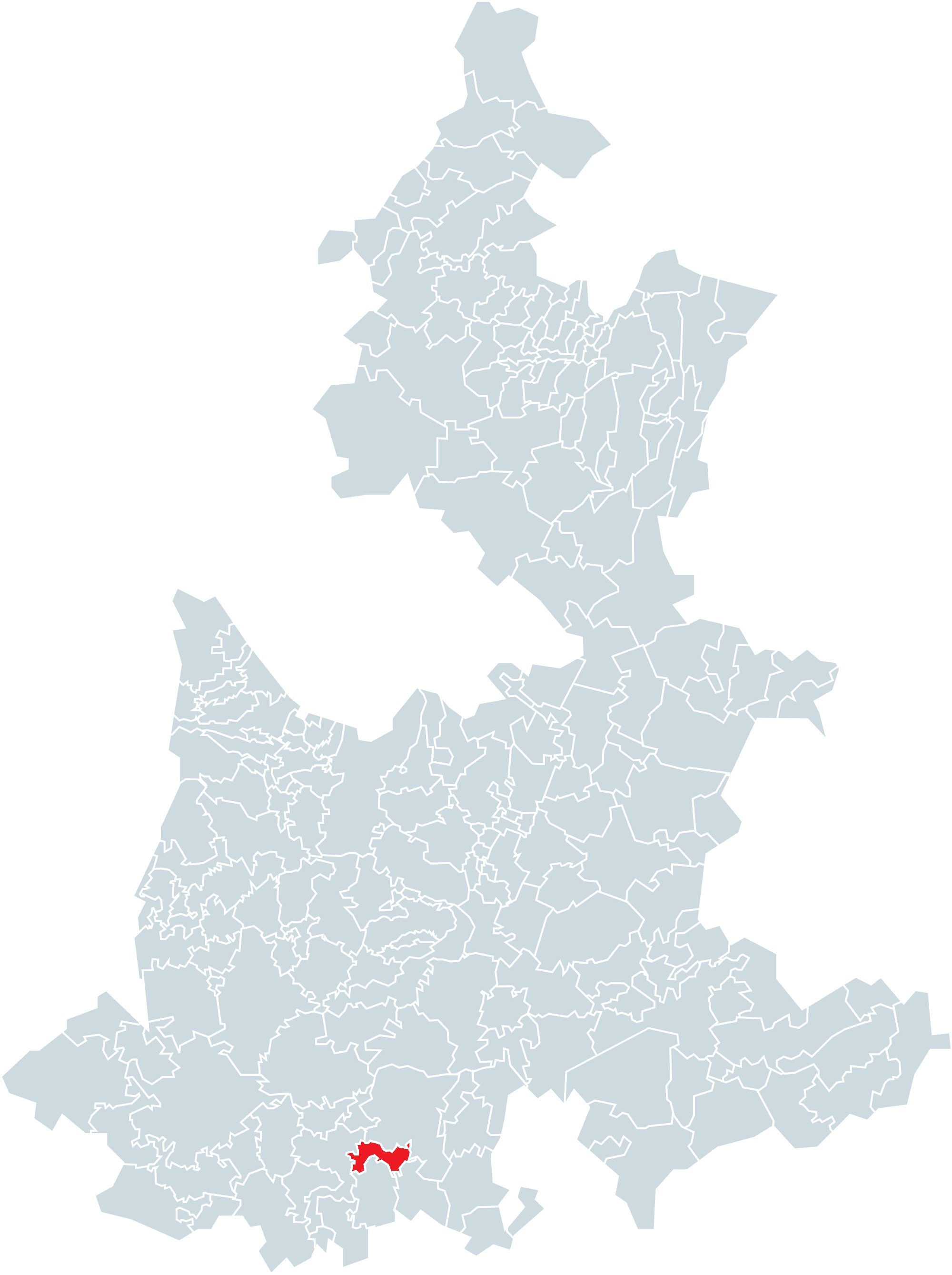 Municipio de San Pablo Anicano